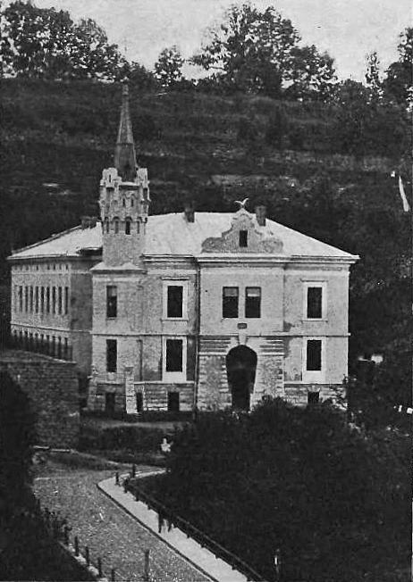 Nowo wybudowany gmach TG "Sokół" w Buczaczu (1907)